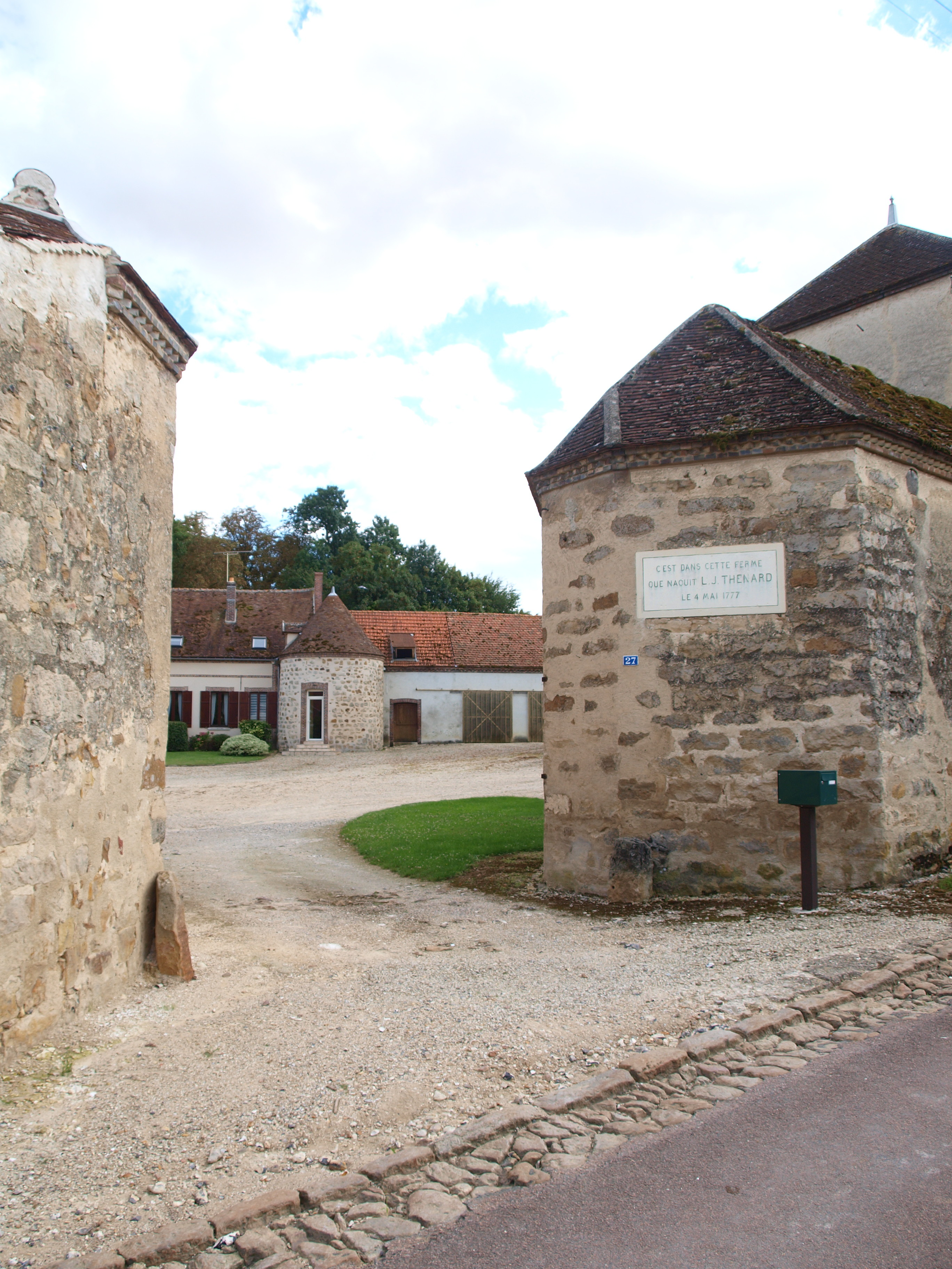 La Louptière-Thénard (Aube, France) ; Louis Jacques Thénard